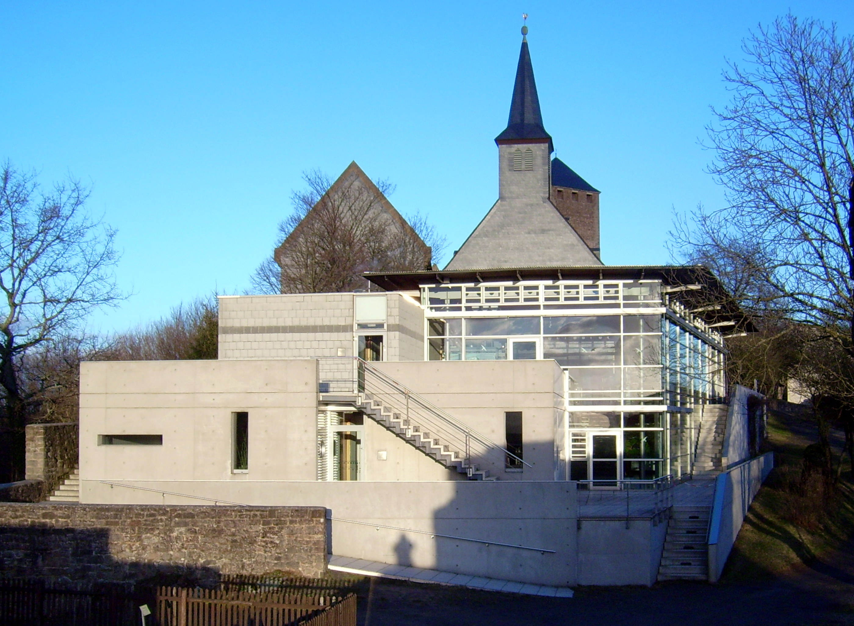 Geoskop (Pfalzmuseum für Naturkunde) auf der Burg Lichtenberg